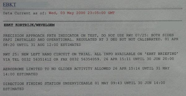 eigen foto